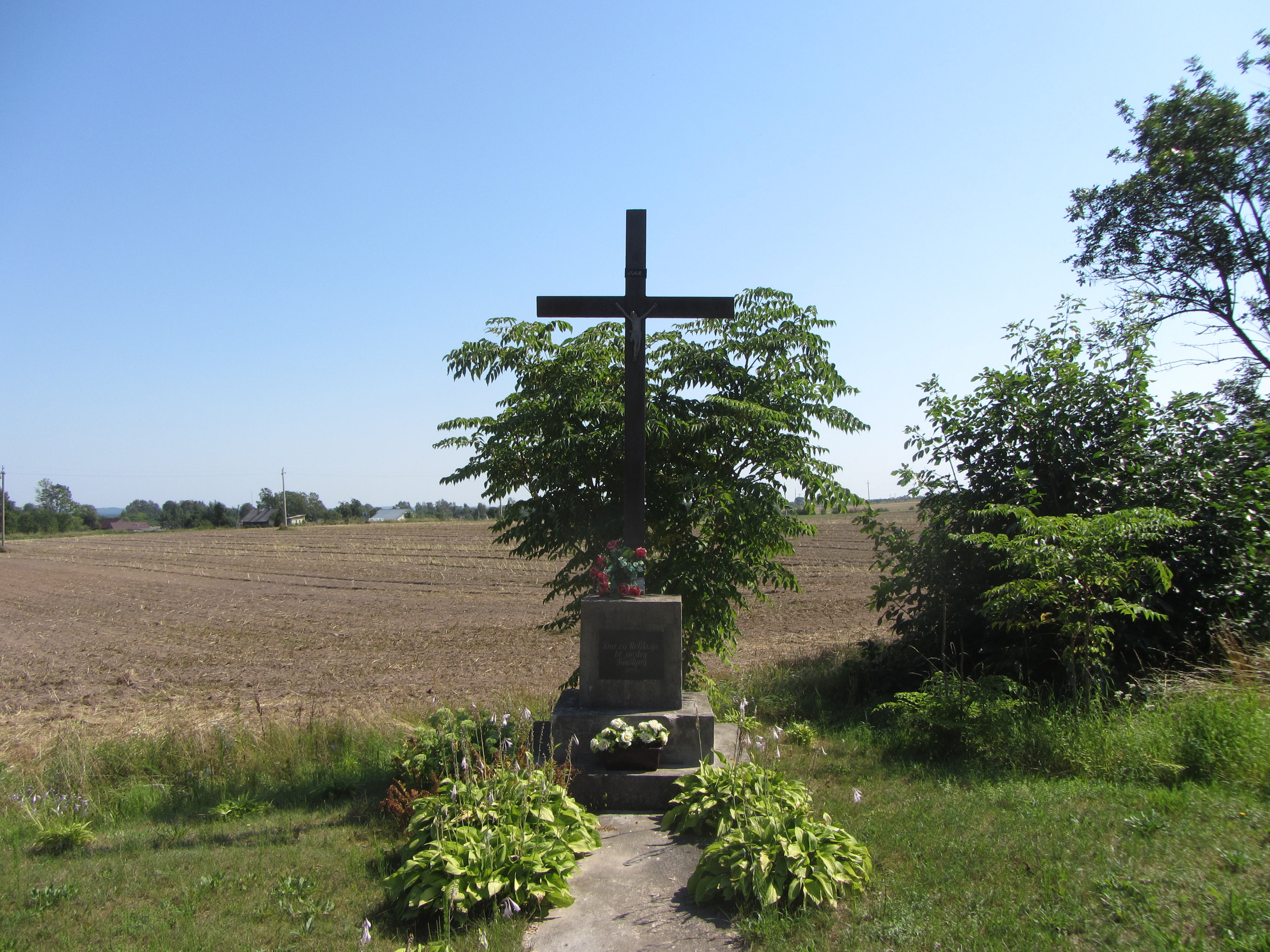 Kalvelių sen., Lithuania